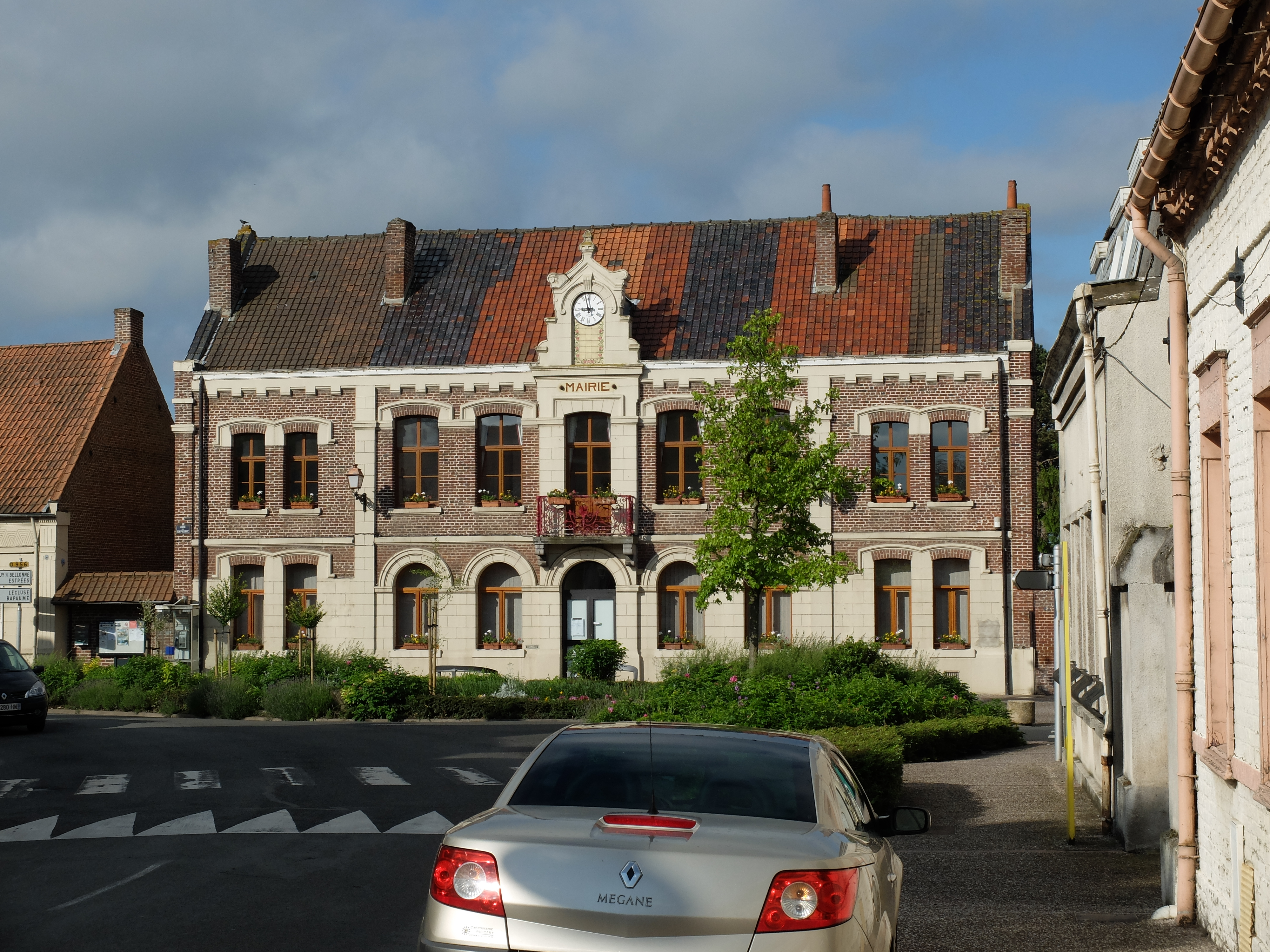 Vue de la mairie de Férin.